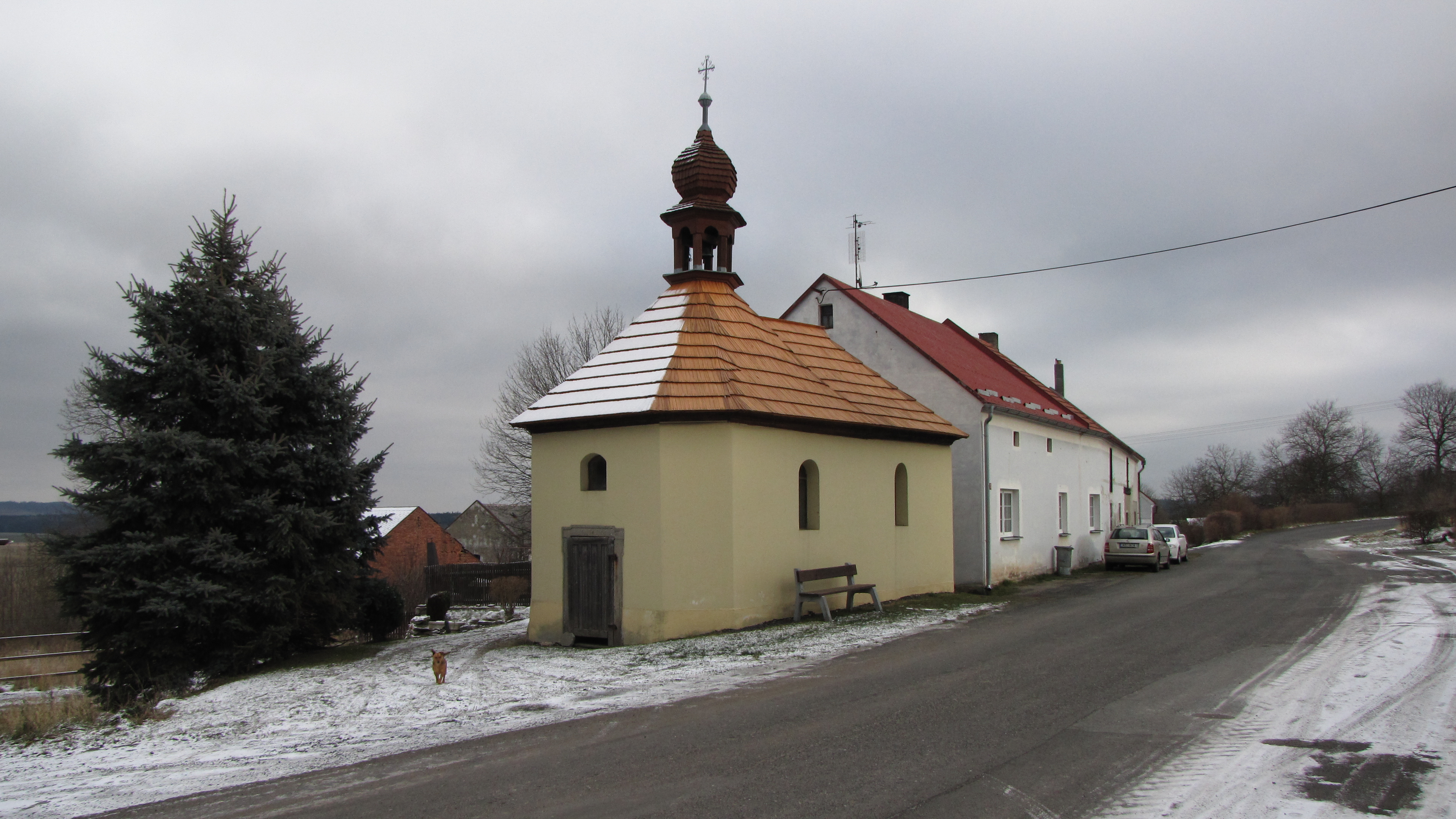 Třebouň